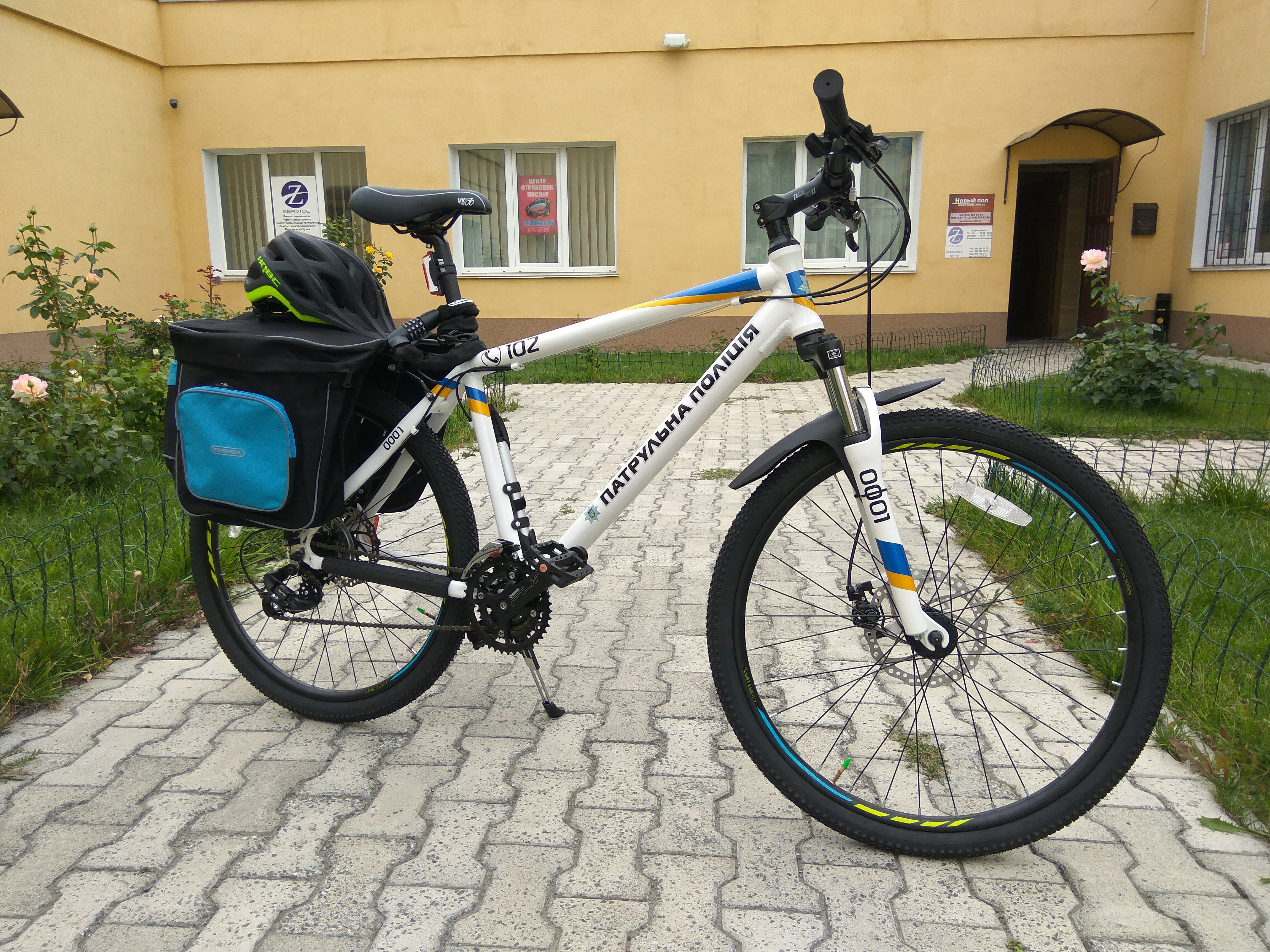 Компанія Veliki.ua розробила та виготовила велосипеди для Львівської поліції, що передала Консультативна місія Європейського Союзу (EUAM).